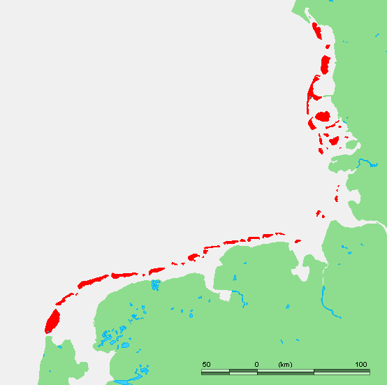 Karte, auf der die Inseln des Wattenmeers der Nordsee markiert sind.